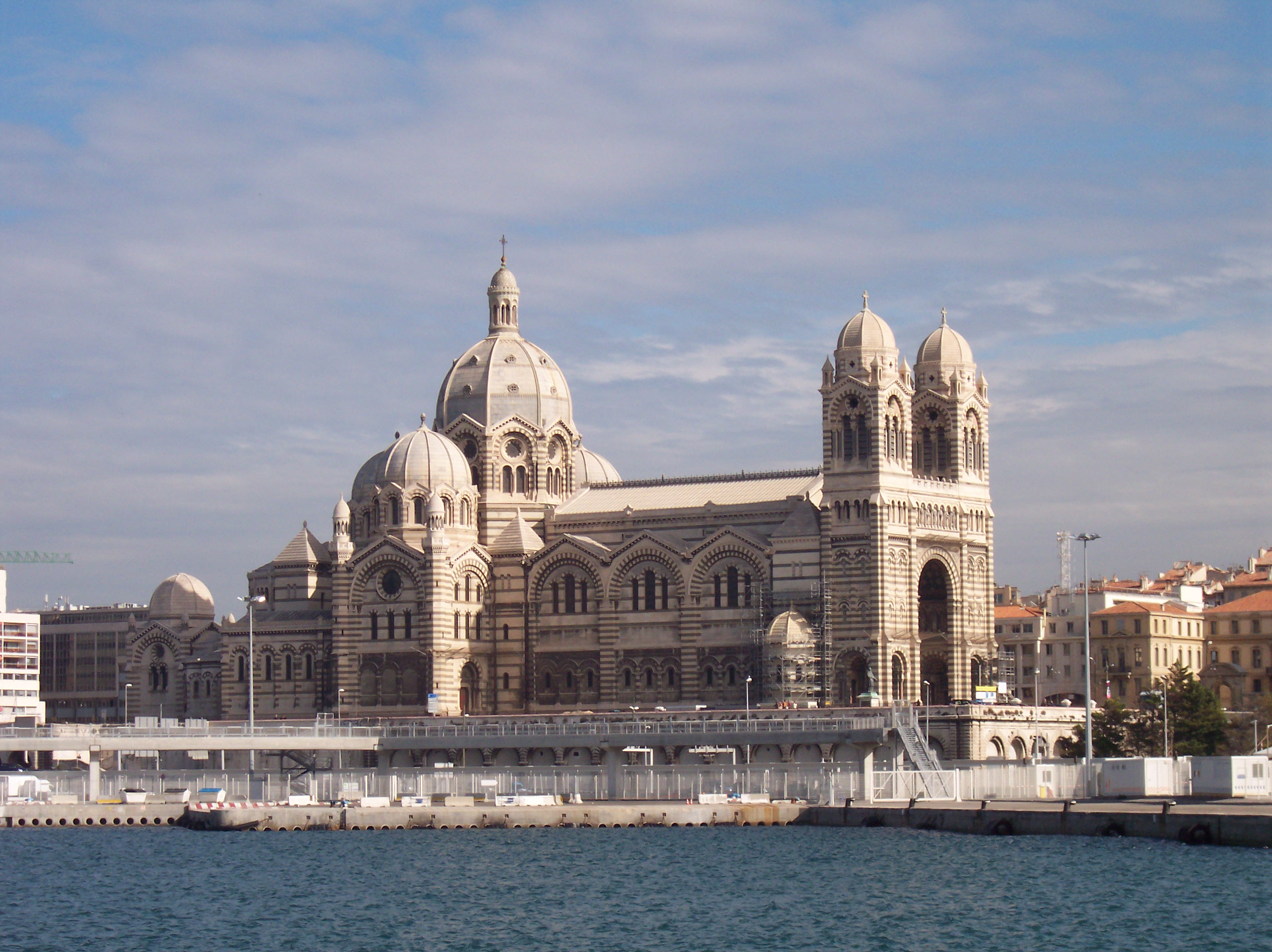 Unha das dúas catedrais da cidade de Marsella